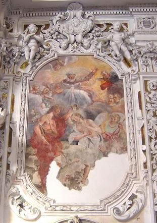 Church Messina Chiesa di Sant'Elia